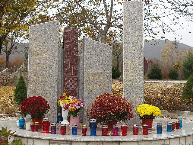 Spomenik žrtvama Domovinskog Rata u Izbičnu,Bosna i Hercegovina